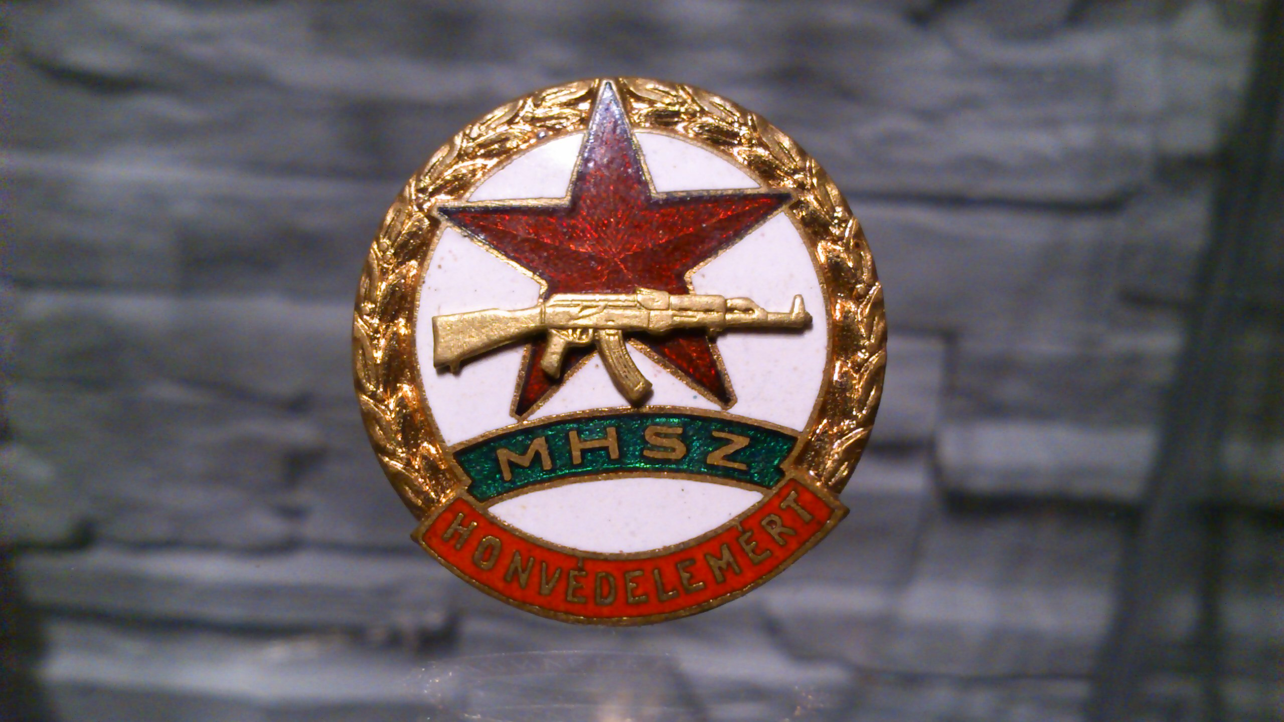 Własność - Muzeum Miniaturowej Sztuki Profesjonalnej Henryk Jan Dominiak ul. Żwakowska 8 m 66 43-100 Tychy - MHSZ HONVÉDELEMÉRT.